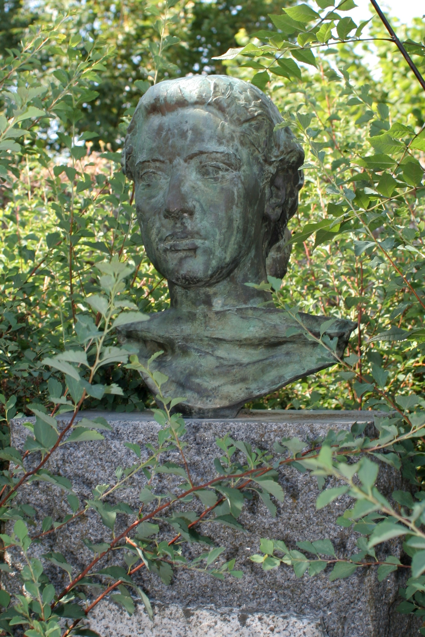 Hédé, Ille-et-Vilaine, Bretagne, France Jean Boucher (sculpteur), Alexis Rudier (fondeur), monument aux volontaires, Hédé, place de l'Église. Bronze fondu et poli, provient de l'étude faite pour le monument aux victimes et aux soldats de Verdun.